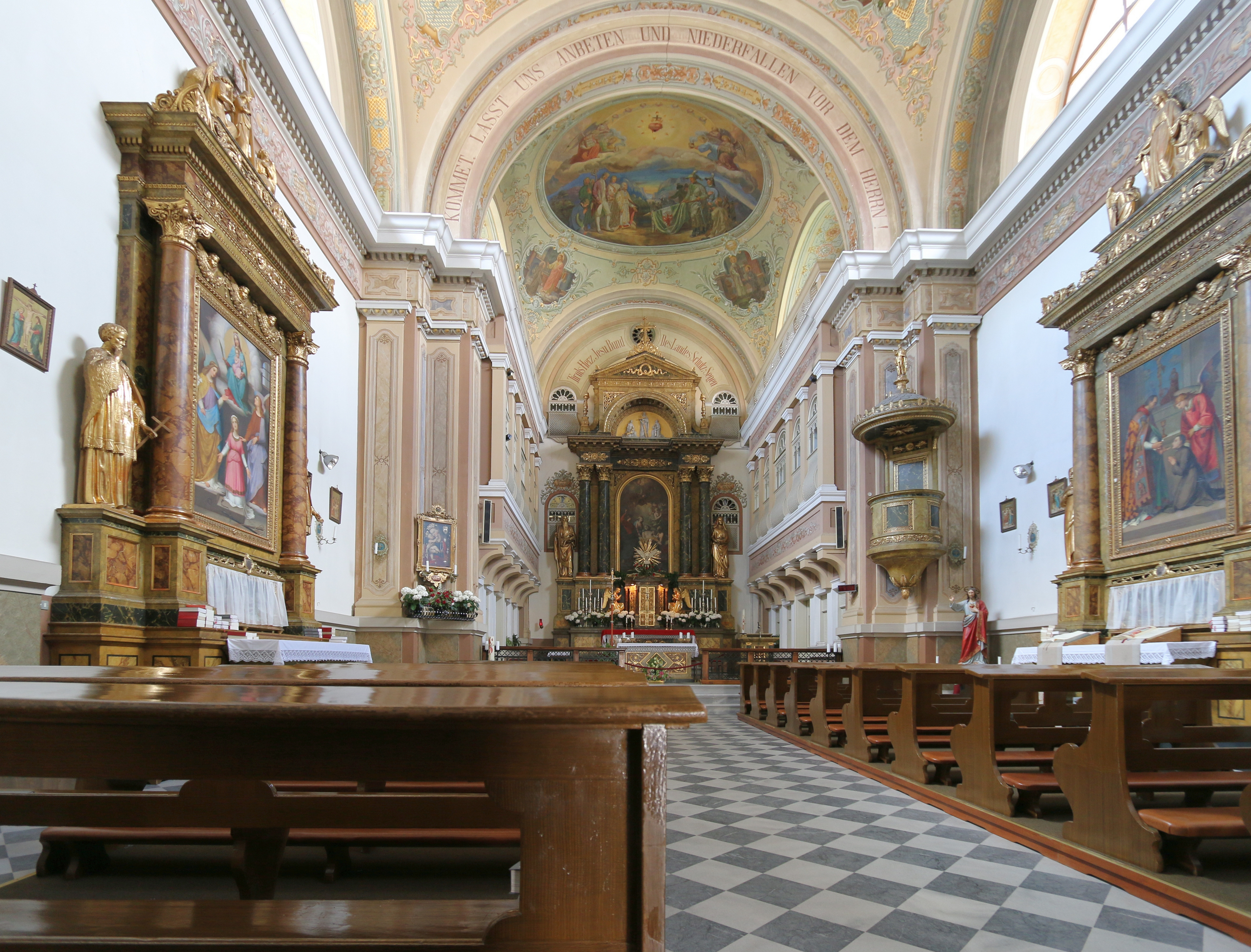 Brixen, Südtirol: St.-Josefs-Kirche